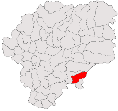 Categorie:Hărţi ale judeţului Bistriţa-Năsăud